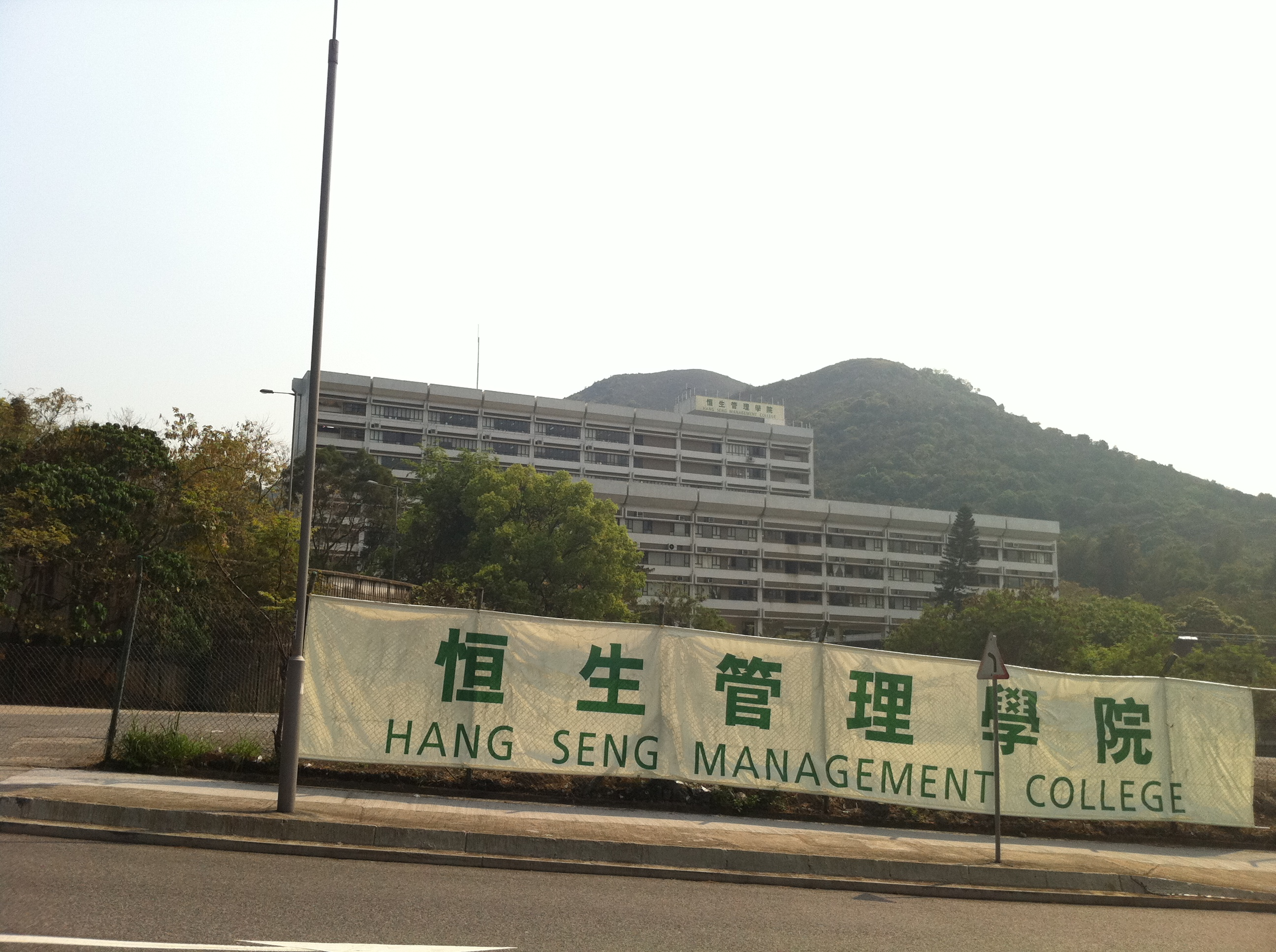 恒生管理學院，2011年4月，攝於牛皮沙街